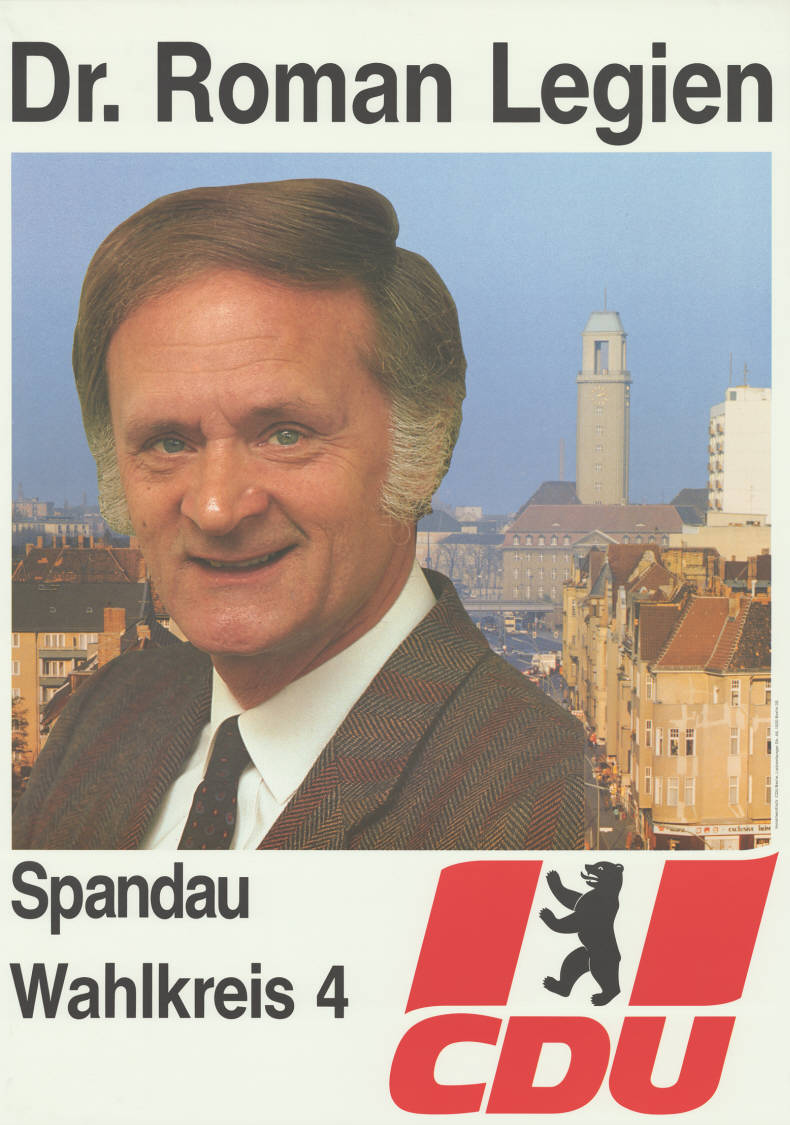 Dr. Roman Legien Spandau ... CDU Abbildung: Porträtfoto vor typischem Spandauer Stadthintergrund - Berliner Bär Plakatart: Kandidaten-/Personenplakat mit Porträt Auftraggeber: Verantw.: CDU Berlin Objekt-Signatur: 10-004 : 697 Bestand: Plakate zu Abgeordnetenhauswahlen Berlin (10-004) GliederungBestand10-18: Plakate zu Abgeordnetenhauswahlen Berlin (10-004) » CDU Lizenz: KAS/ACDP 10-004 : 697 CC-BY-SA 3.0 DE